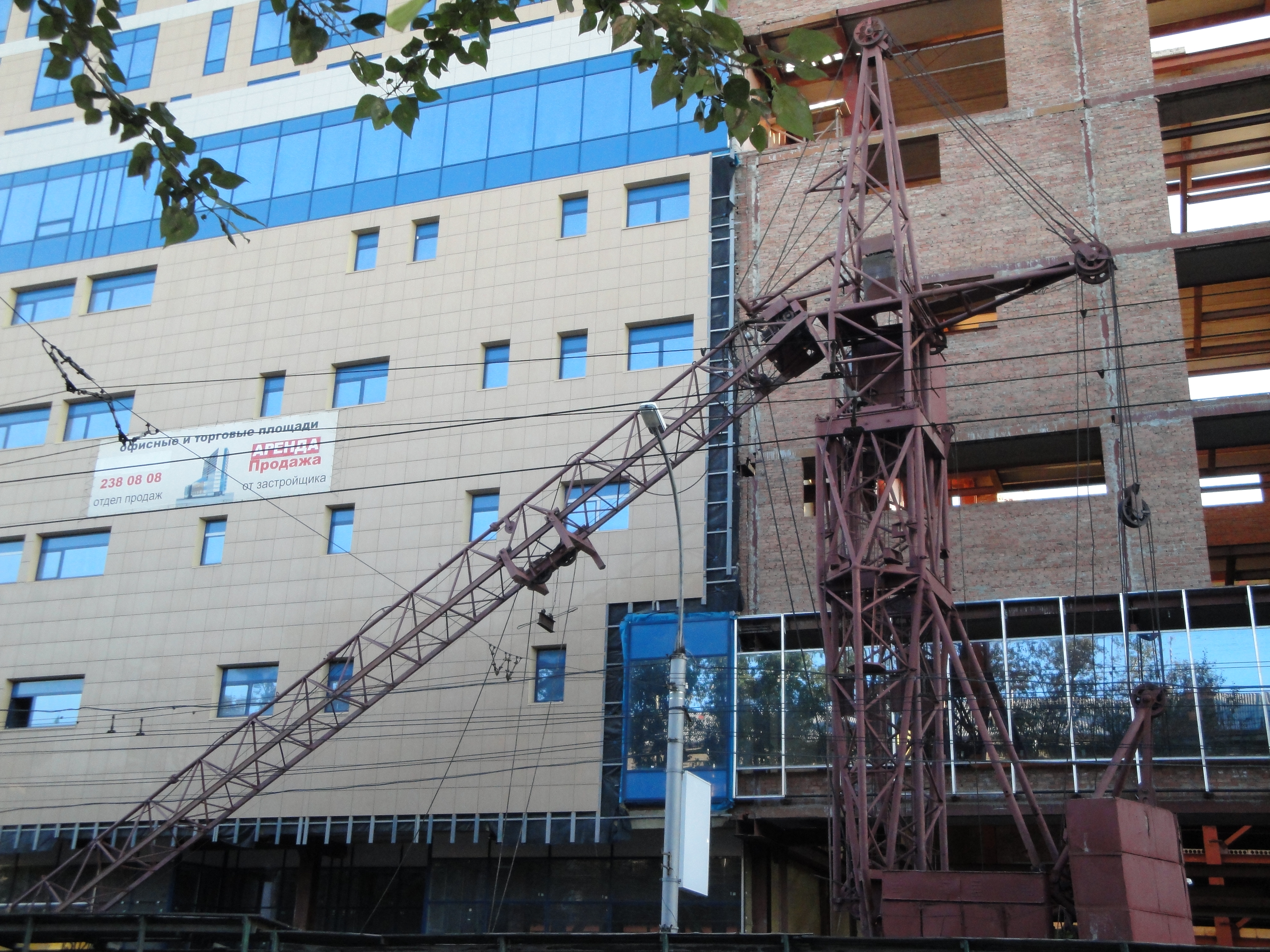 Кран КБ-403 на стадии монтажа